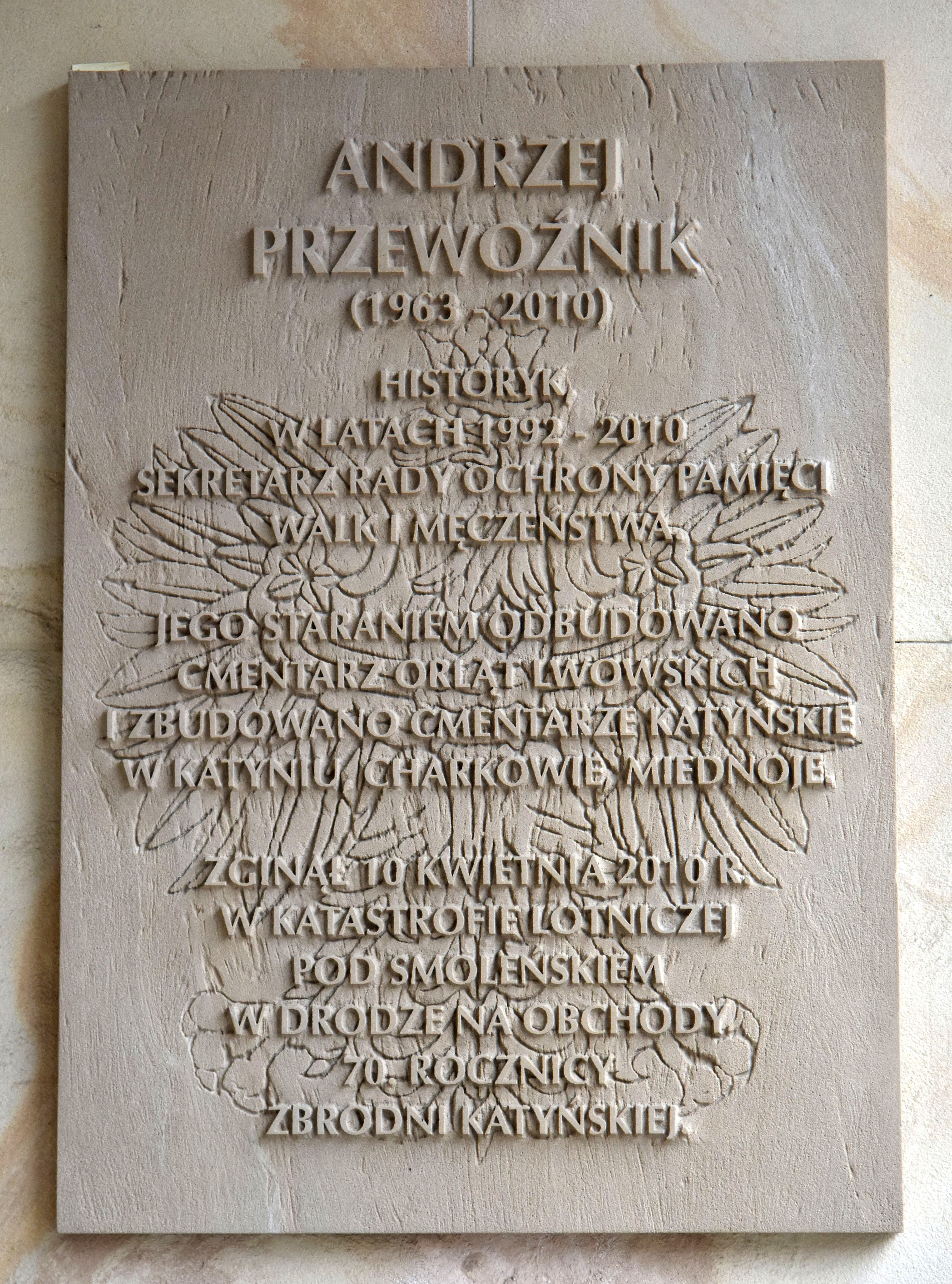 Tablica upamiętniająca Andrzeja Przewoźnika przy ul. Wspólnej 2/4 w Warszawie (od strony dziedzińca)